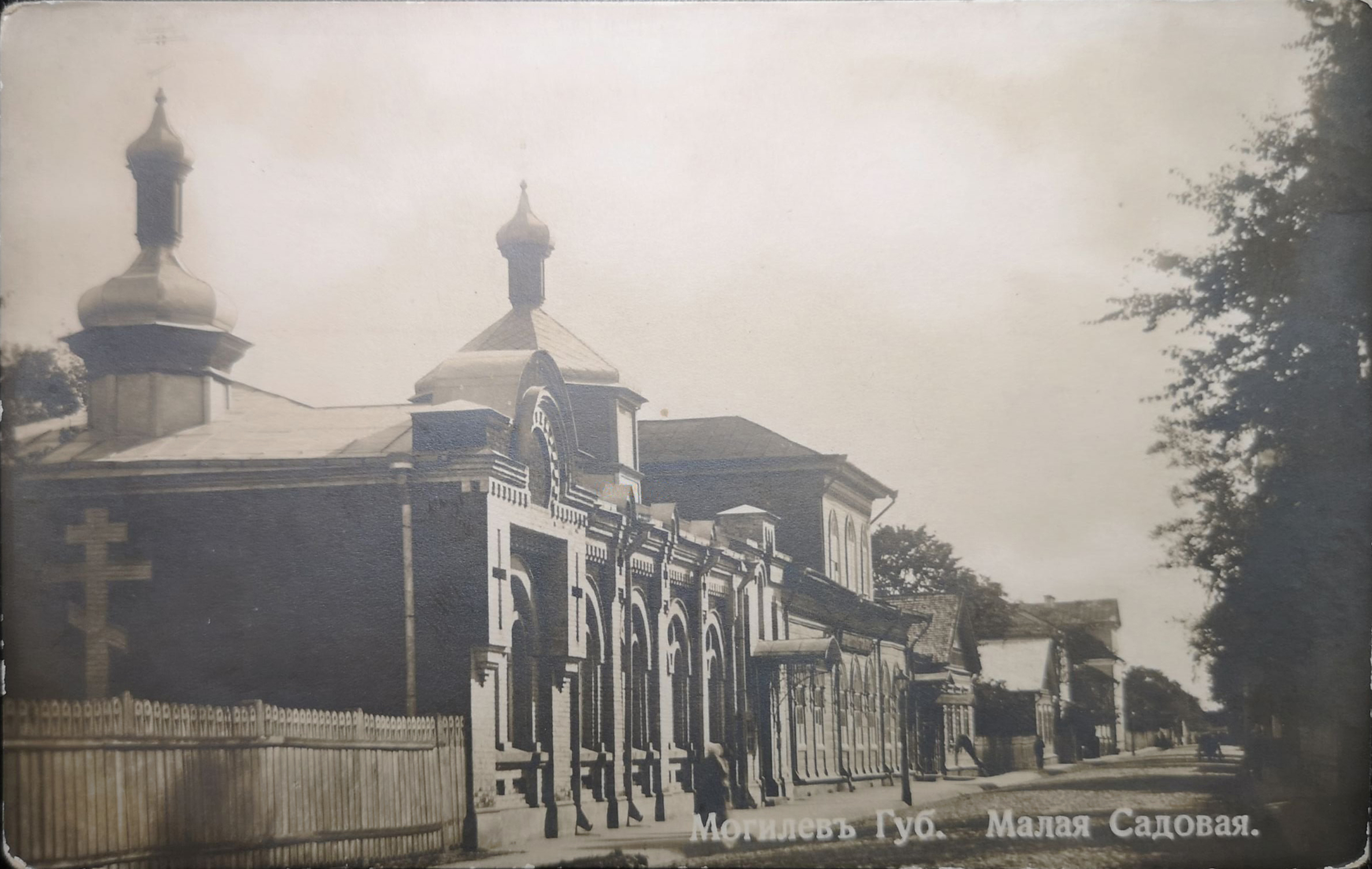 Беларуская (тарашкевіца): Магілёў (Mahiloŭ), вуліца Малая Садовая (vulica Małaja Sadovaja)